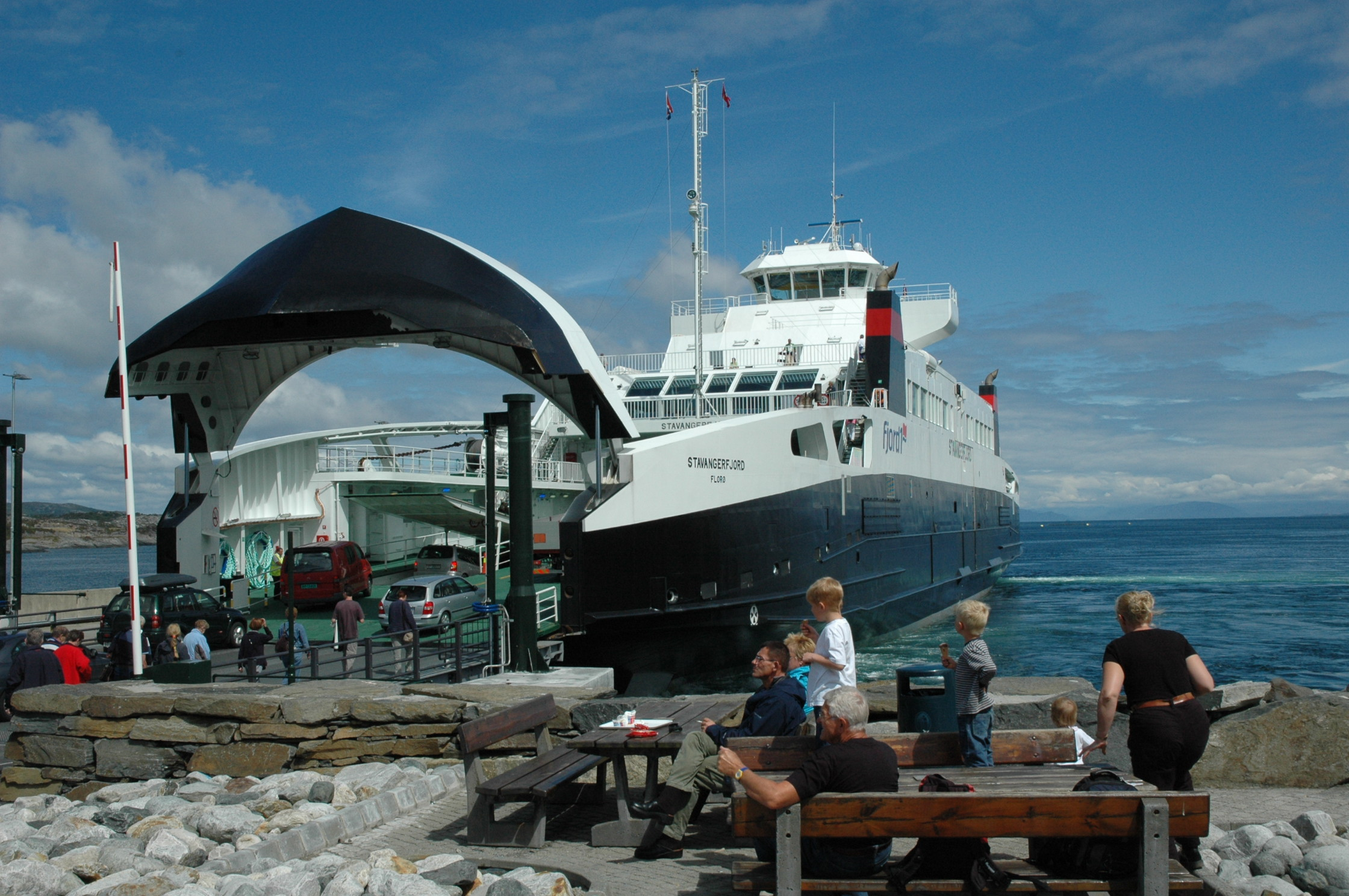 MF Stavangerfjord ved kai i Arsvågen på Bokn